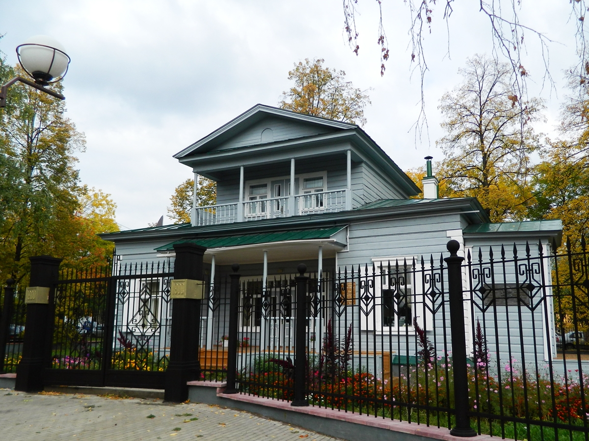 Дом-музей В. И. Ленина (Уфа).jpg